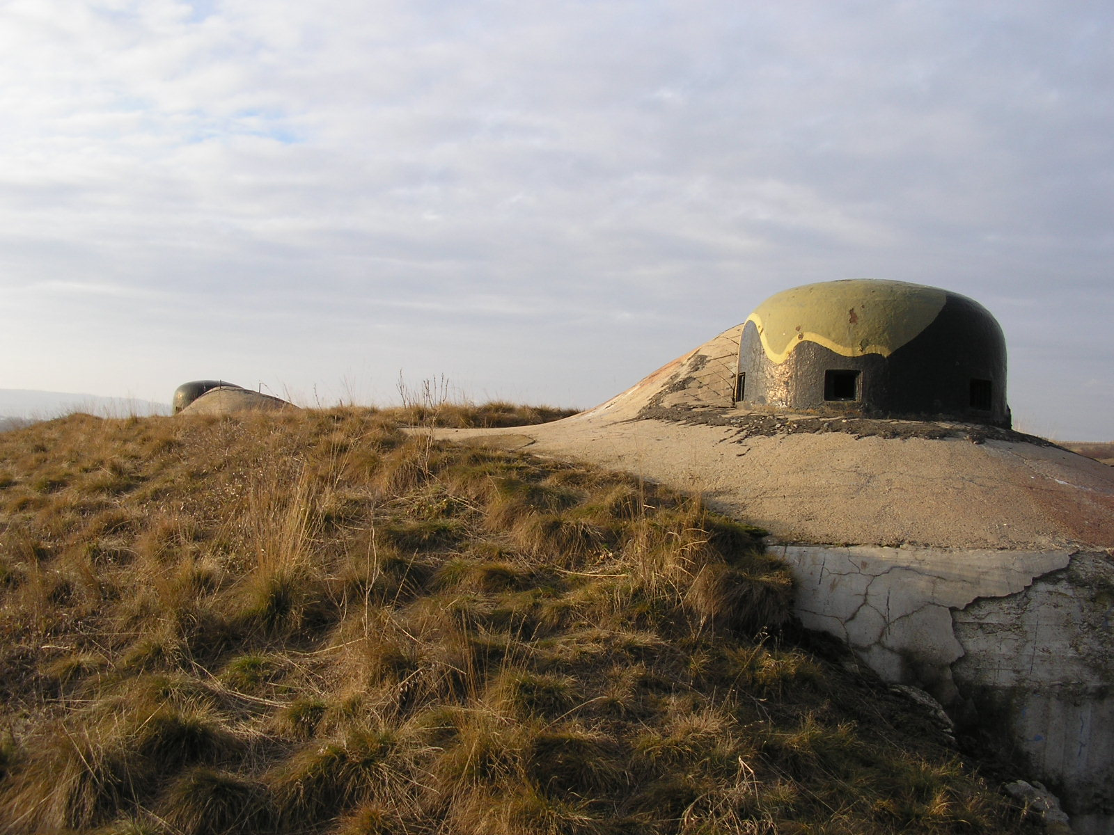 Pěchotní srub MJ-S 4 Zatáčka